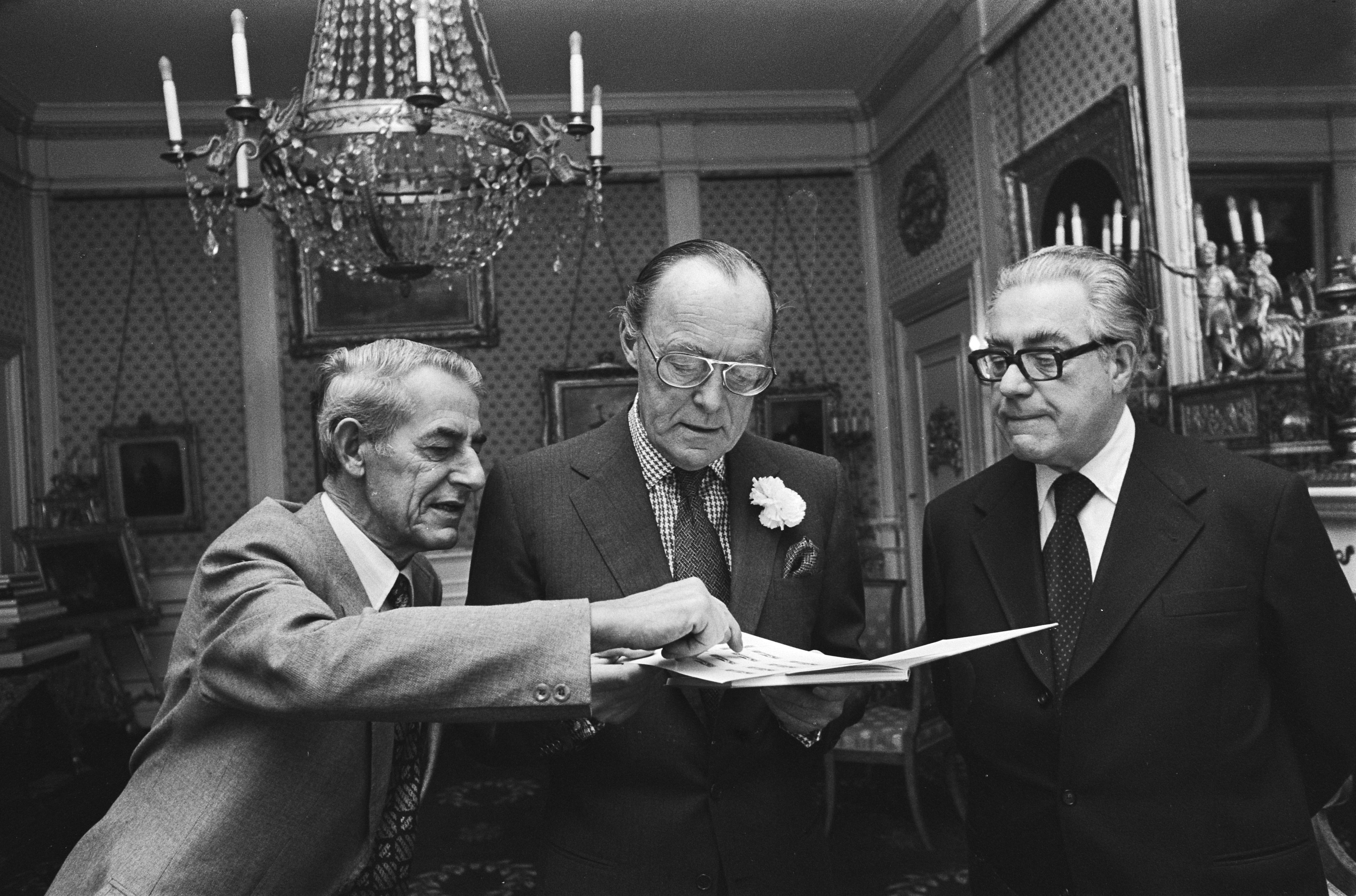 Collectie / Archief : Fotocollectie Anefo Reportage / Serie : [ onbekend ] Beschrijving : Prins Bernhard ontvangt op Soestdijk 17-delige filatelistische studie van dr. G.C. van Balen Blanken; v.l.n.r Bert Buurman, prins Bernhar, Van Balen Blanken Datum : 20 januari 1977 Locatie : Soestdijk, Utrecht Trefwoorden : boeken, filatelie, koninklijk huis, prinses Persoonsnaam : Balen Blanken G. C van, Bernhard, prins, Buurman Bert Fotograaf : Verhoeff, Bert / Anefo Auteursrechthebbende : Nationaal Archief Materiaalsoort : Negatief (zwart/wit) Nummer archiefinventaris : bekijk toegang 2.24.01.05 Bestanddeelnummer : 928-9893